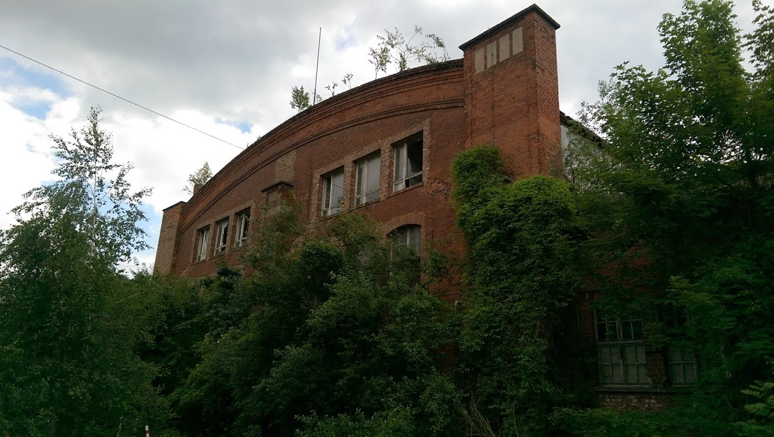 Erfurt Bw P 11